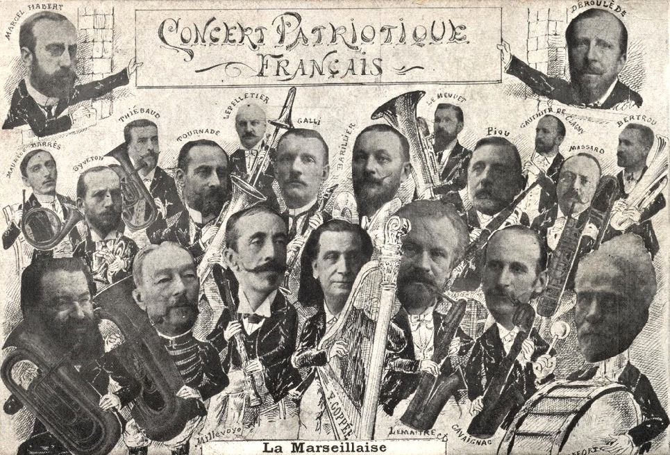 Carte postale française avec un photomontage des principaux hommes politiques nationalistes et antidreyfusards du début du XXe siècle.